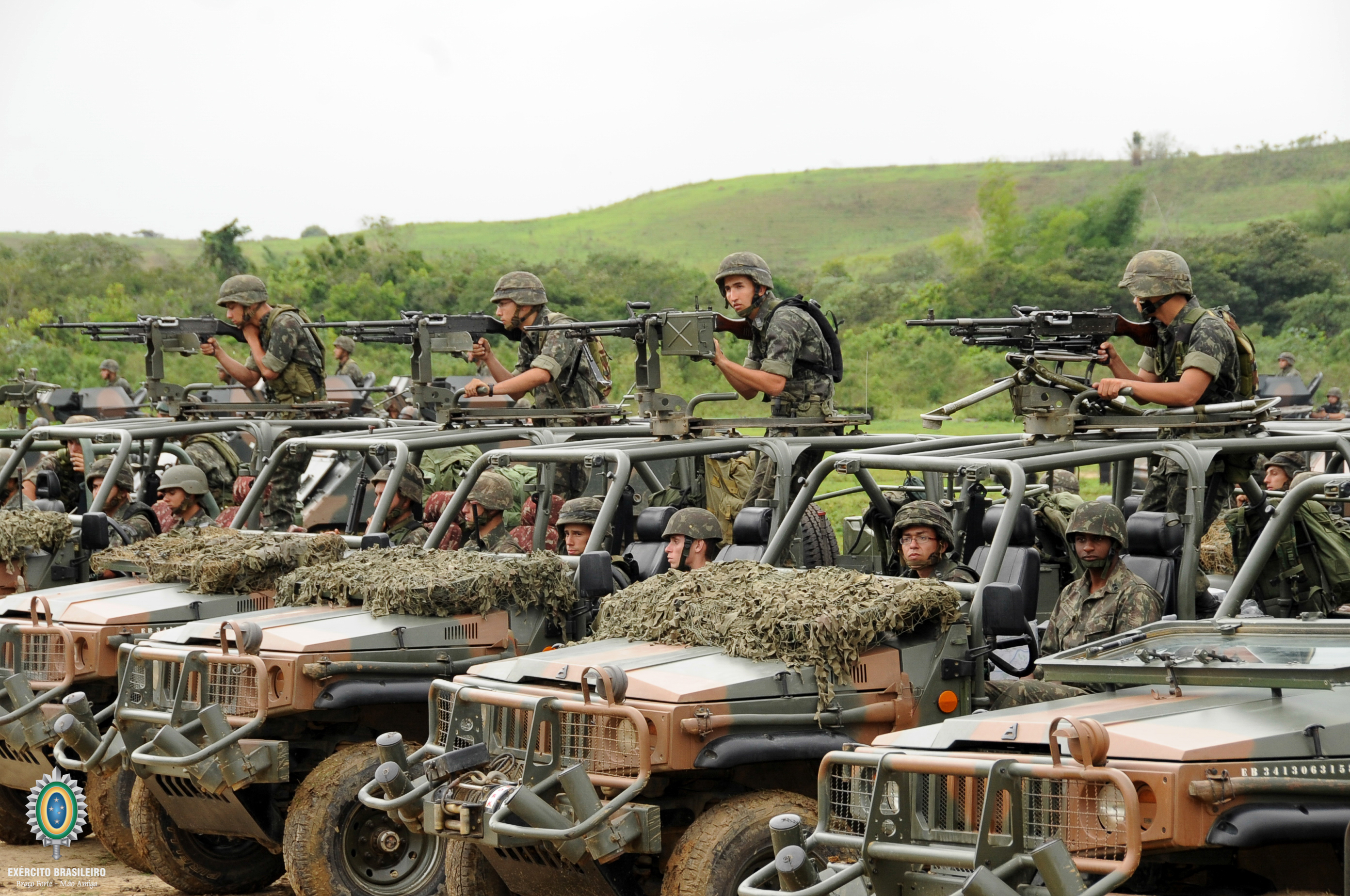 Cavalaria